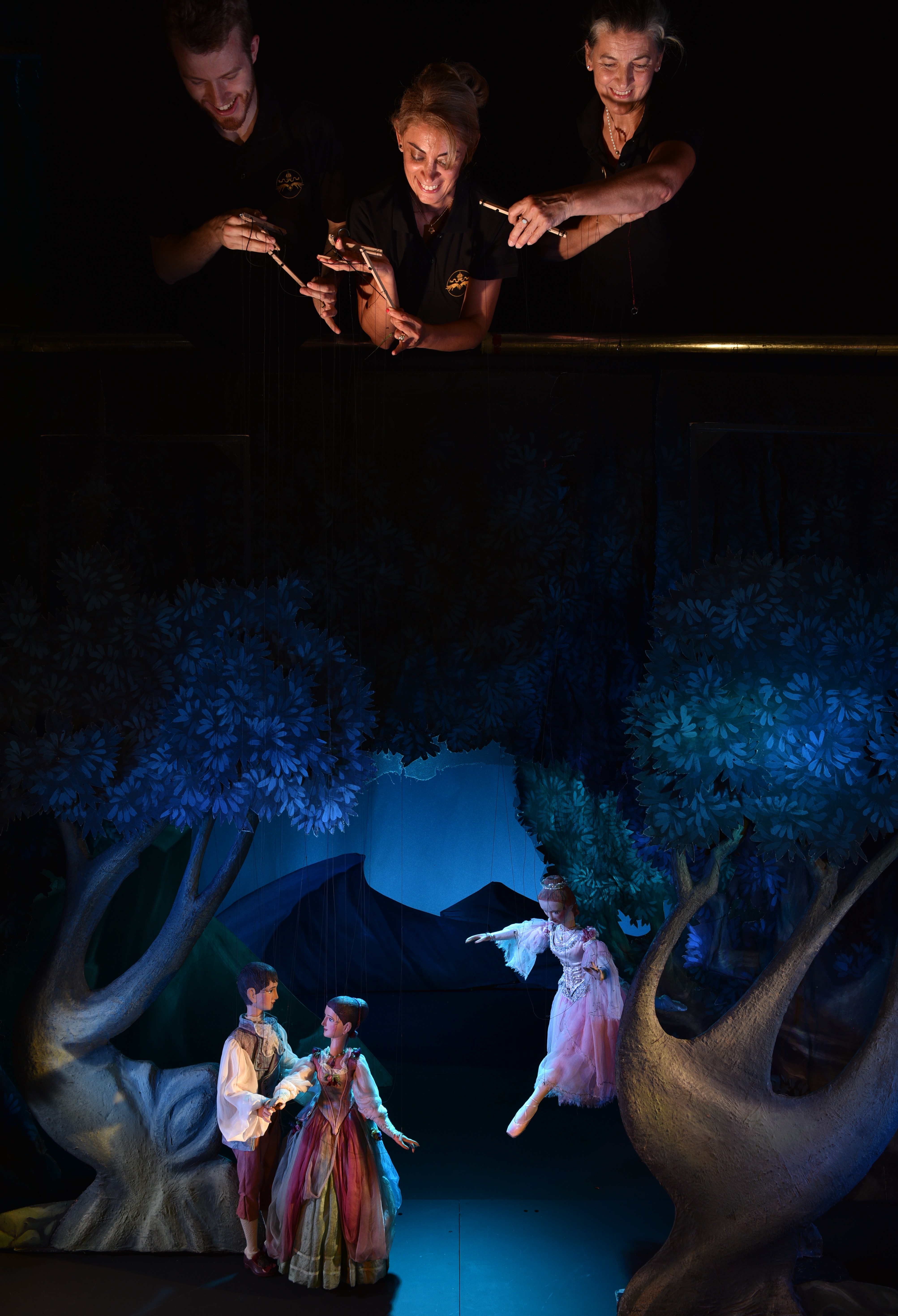 Die Arbeit auf der Bühne erfordert nicht nur höchste Konzentration, sondern ist auch körperlich sehr anstrengend.